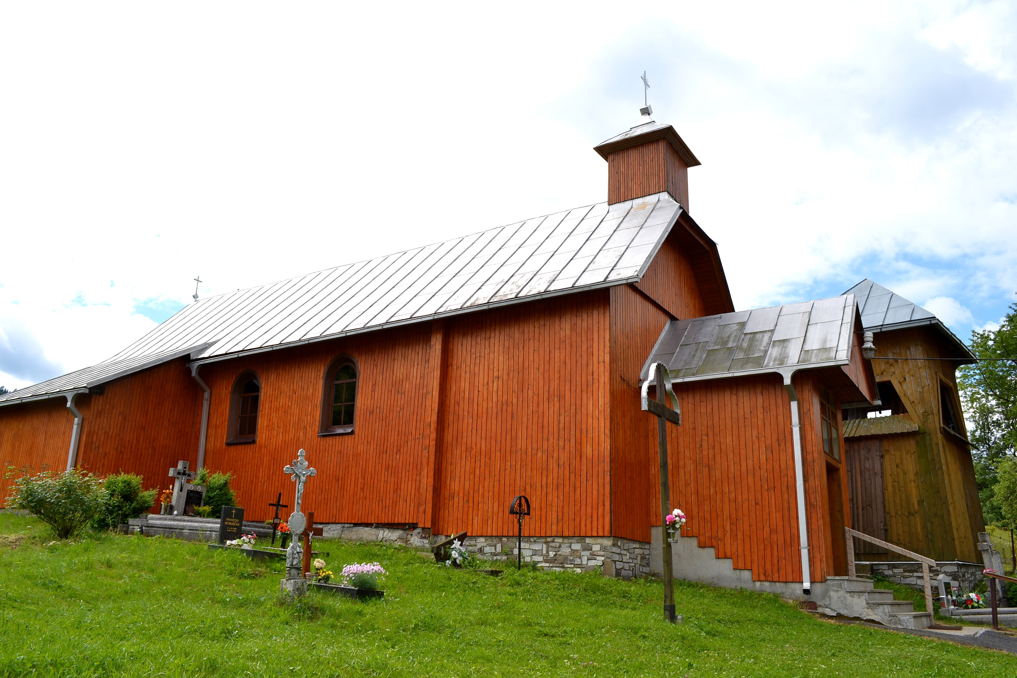 Drevený kostol svätého Jozefa v Malej Frankovej; celkový pohľad